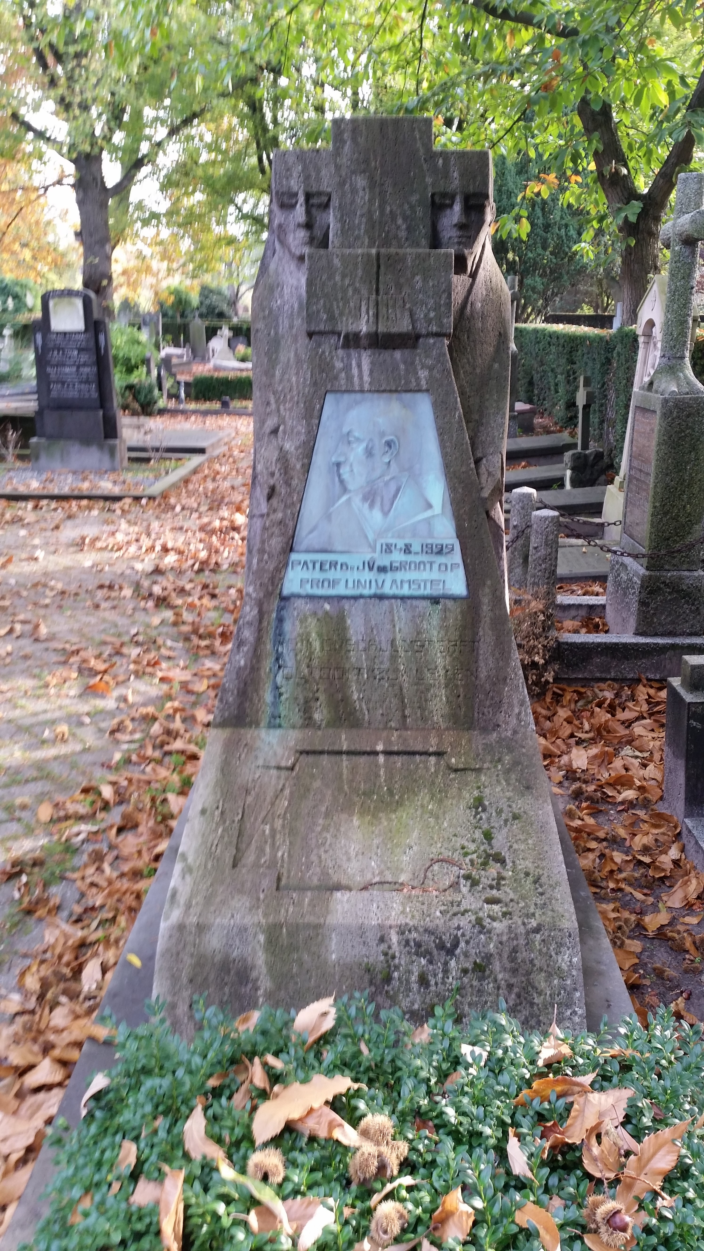 Grafmonument J.V. de Groot, vooraanzicht